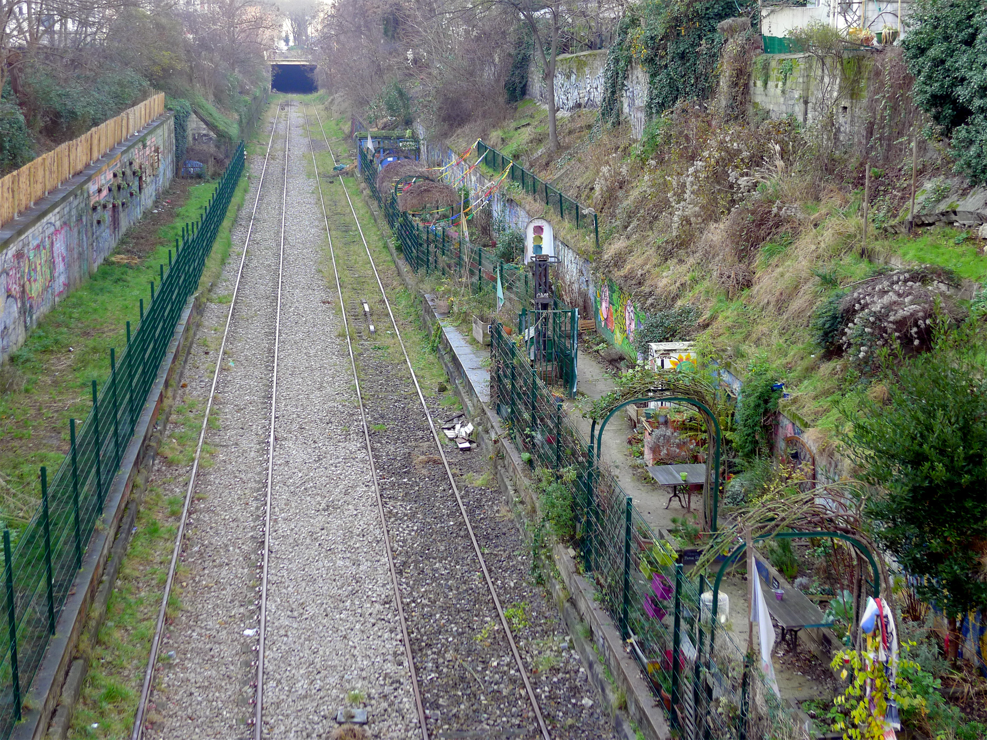 Jardins du Ruisseau aménagés sur la ligne de Petite Ceinture vus depuis la rue du Ruisseau - Paris XVIII